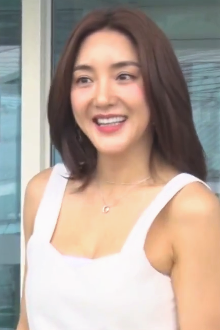 180606 출국길